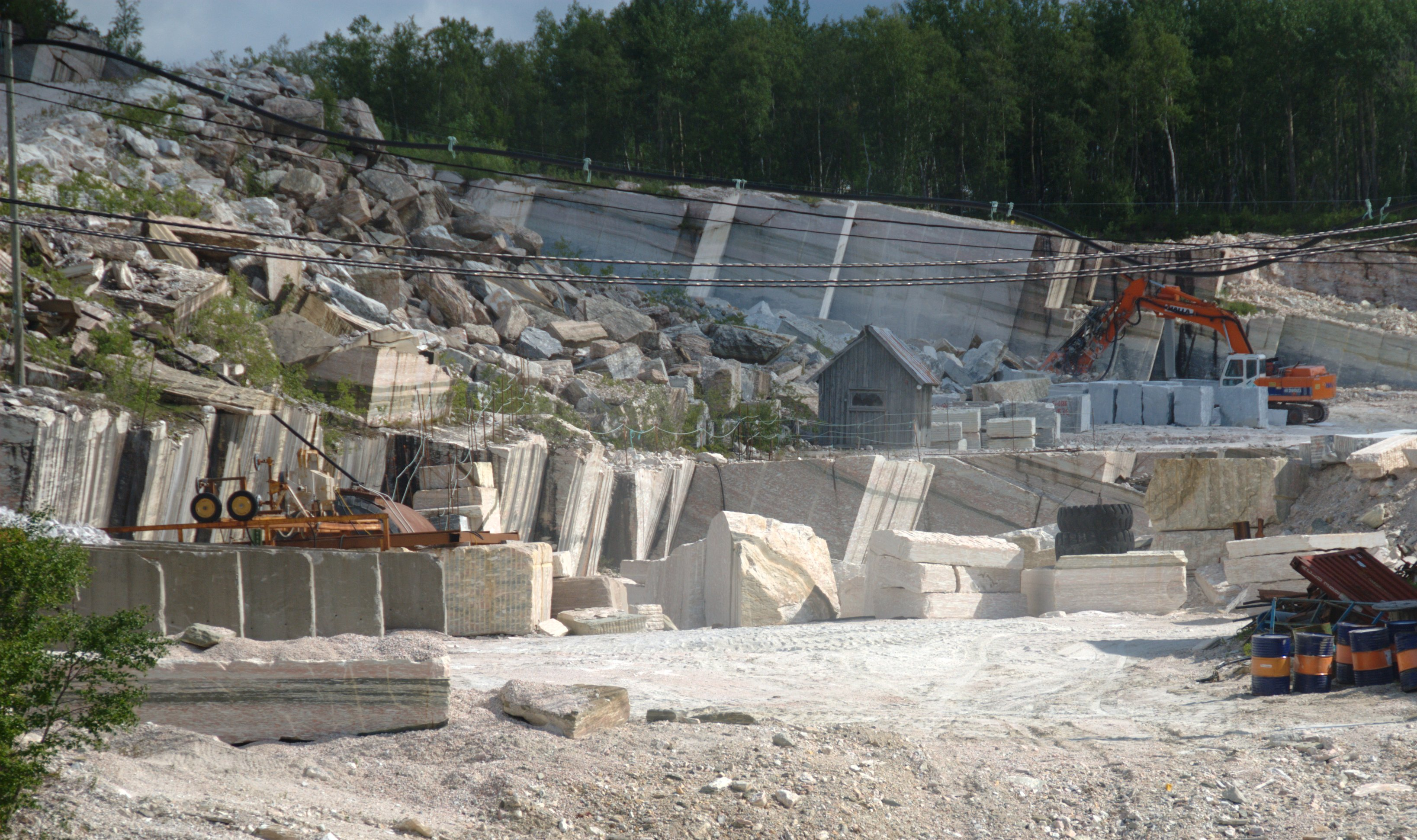 Marmorbrot Fauske (Norwegian Rose}